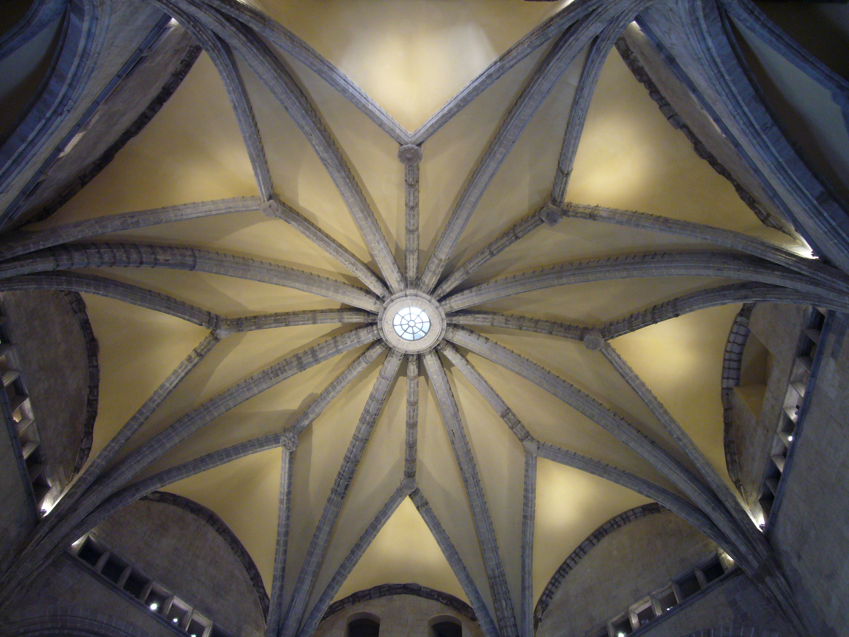 Napoli, Castel Nuovo: volta della sala dei baroni